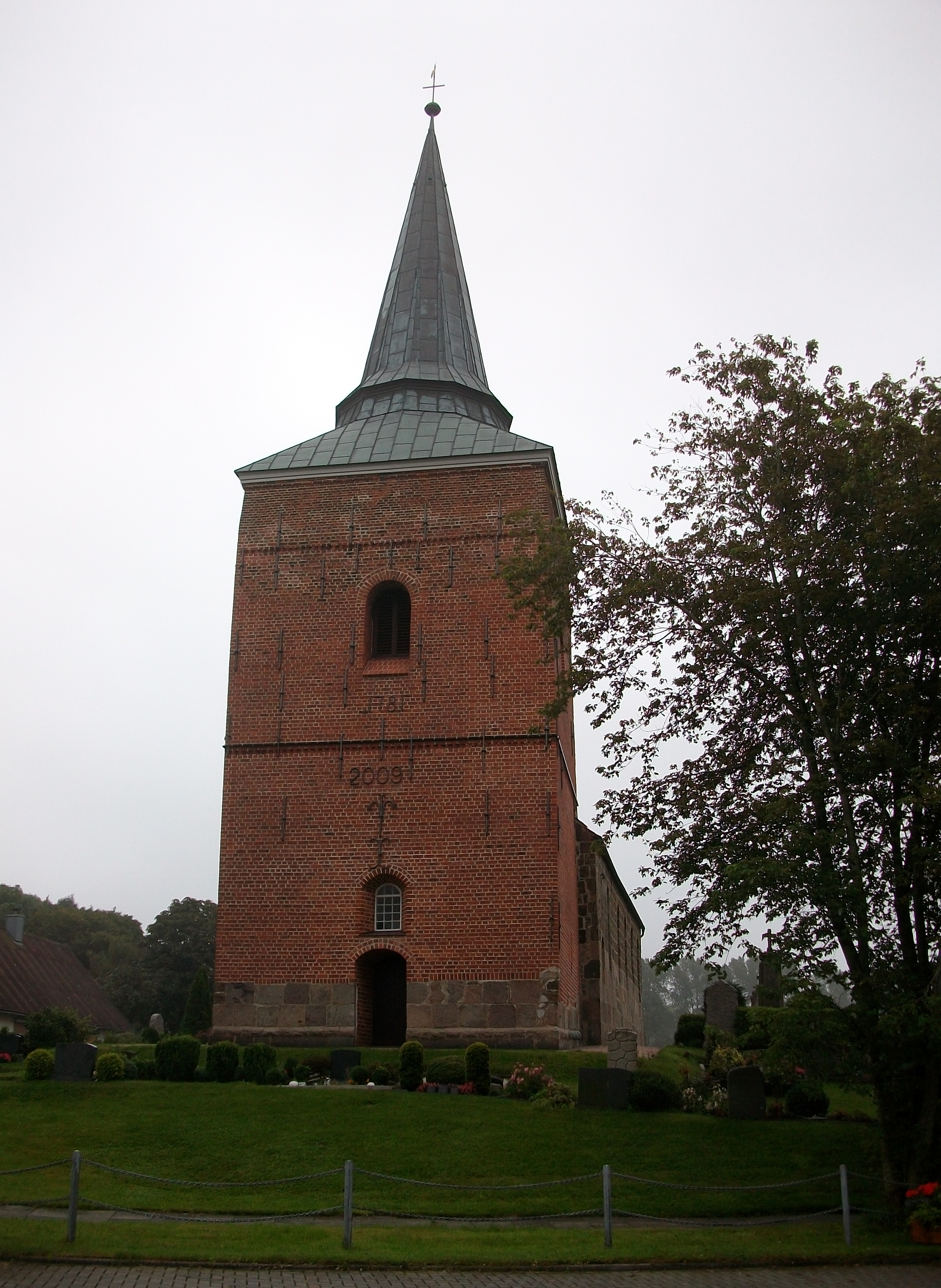 Denkmalgeschützte Kirche in Padingbüttel. Die St.-Matthäus-Kirche wurde im 13. Jahrhundert gebaut. Der Westturm stammt aus dem 15. Jahrhundert.